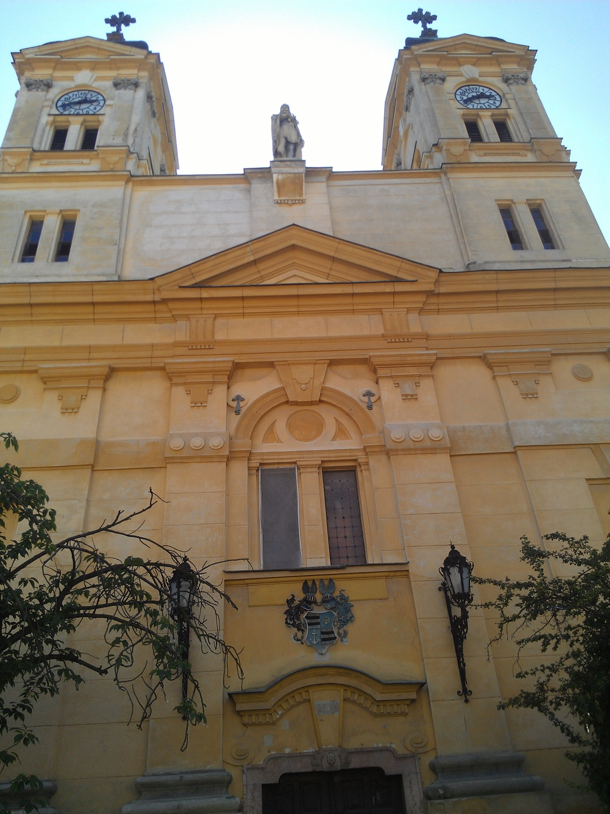 Kostol sv. Michala, Levice